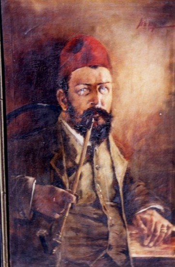 Jozef Néčei